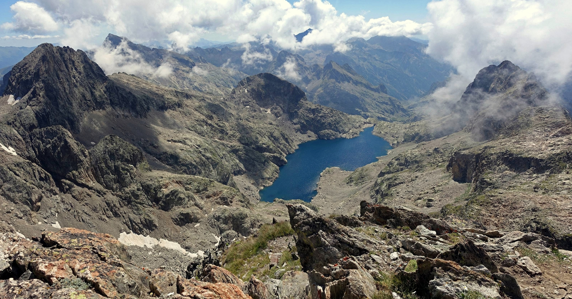 Le lac Long, dans le parc national du Mercantour, vu depuis le balcon du Gélas, Alpes-Maritimes, France.